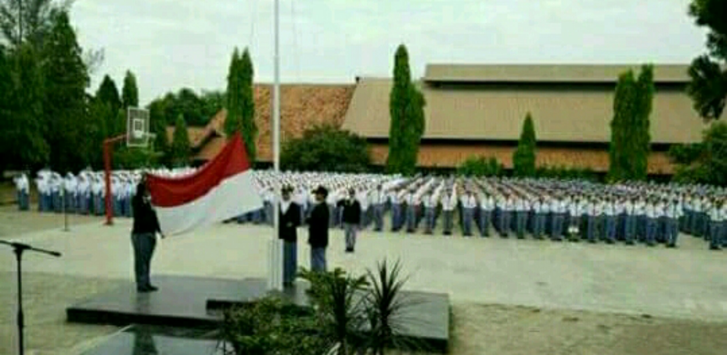 Upacara Bendera SMK Negeri 1 Cikampek